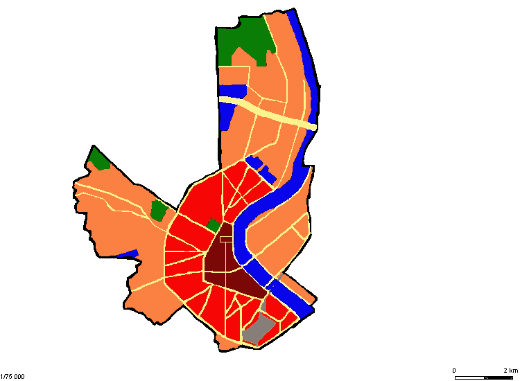 Stadtstruktur von Bordeaux. Selbst erstellt von Benutzer:Bordeaux. Originalbild abgespeichert als jpg von Benutzer:Bordeaux. Nach png konvertiert von Benutzer:Phrood. Orignialbild: Bild:Bordeaux-plan-ville.JPG